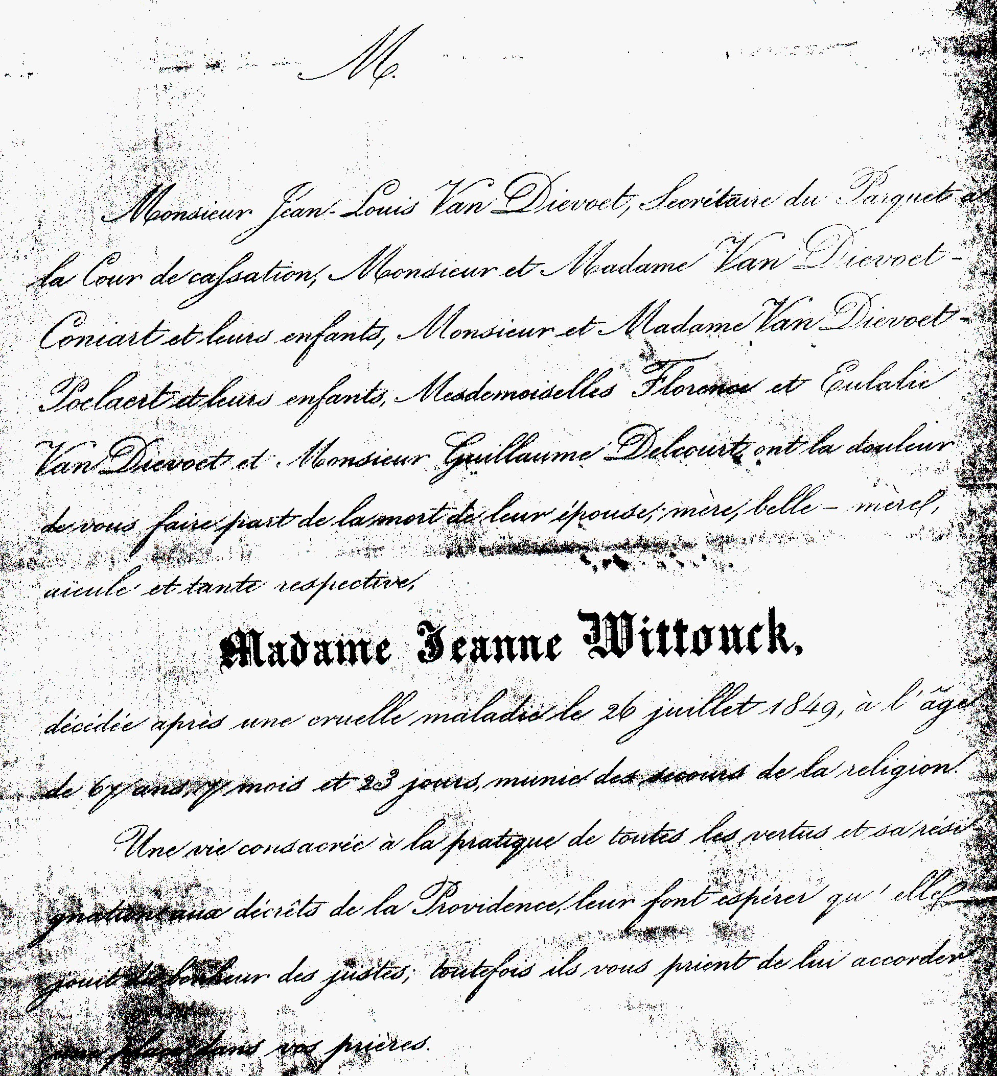 Faire-part de décès de Jeanne Wittouck, née à Bruxelles le 3 décembre 1781 et décédée à Bruxelles en son domicile 16 rue des Bogards (section 8) le 26 juillet 1849, emportée par l'épidémie de choléra, fille de Guillaume Wittouck, conseiller à la Cour Supérieure de Justice de Bruxelles et d'Anne-Marie Cools, elle était l'épouse de Jean-Louis Van Dievoet, secrétaire du Parquet de la Cour de Cassation, né à Bruxelles le 24 novembre 1777 et y décédé en son domicile 16 rue des Bogards (section 8) le 16 mai 1854.